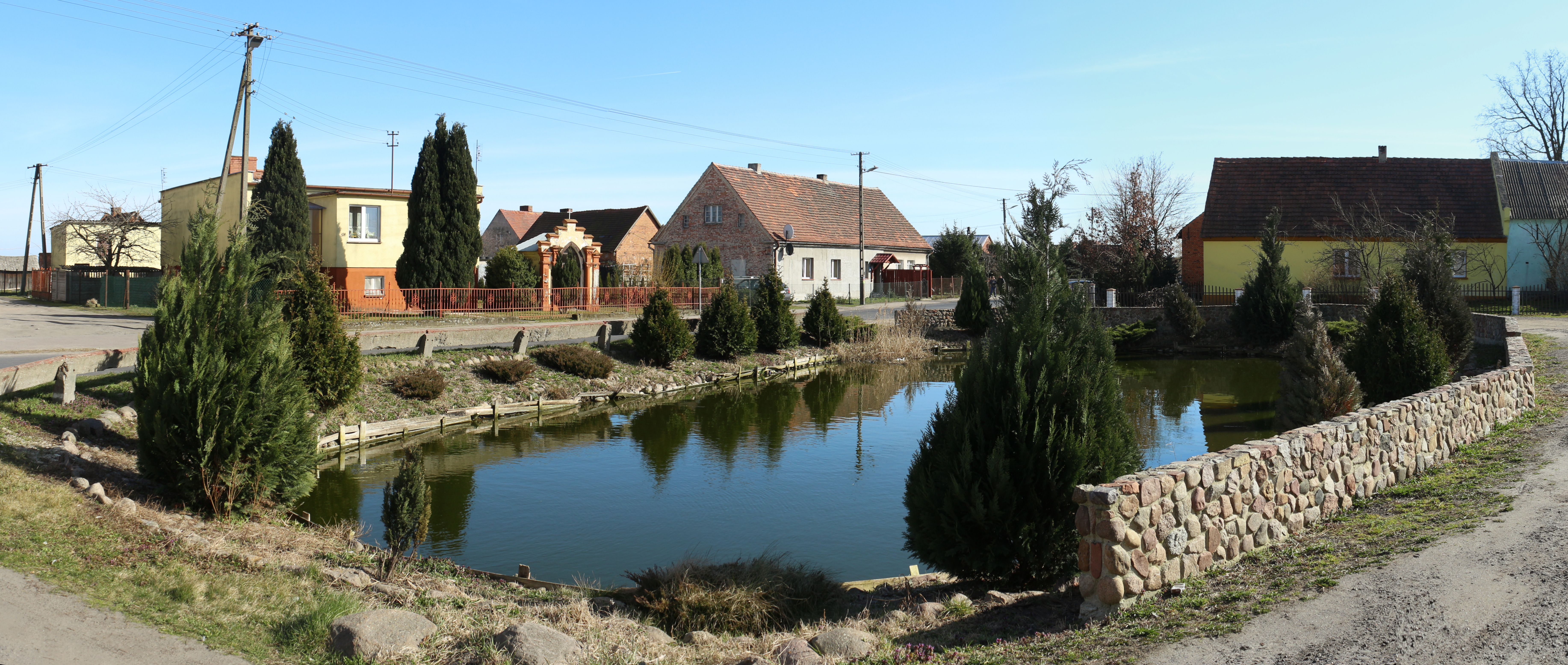 Konradowo, staw